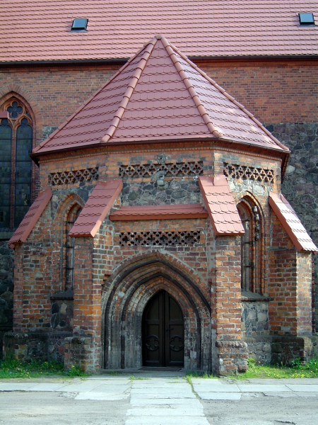 Rzepin, gotycka ceglana kaplica przy kościele z XV wieku z ostrołukowym potralem i o sklepieniu krzyżowo-żebrowym, 05.2004